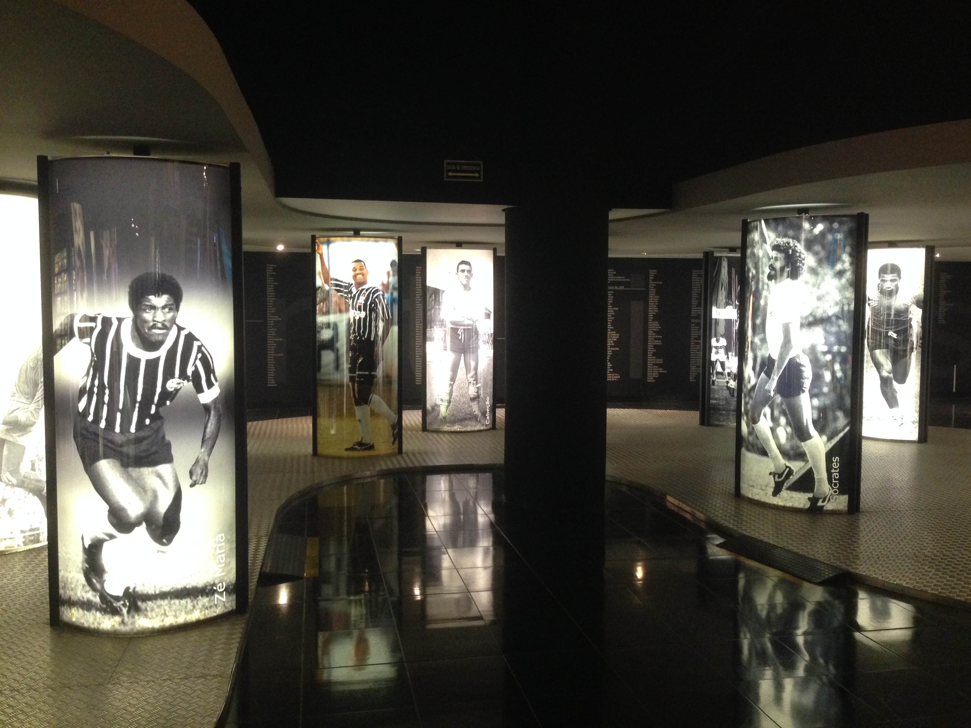 Essa foto foi tirada no Memorial do Corinthians, para realização de um trabalho dentro da Wikipedia